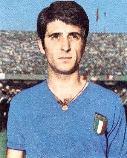 Gianni Rivera en équipe nationale en 1968 - Campioni dello Sport 1968-1969, n°88